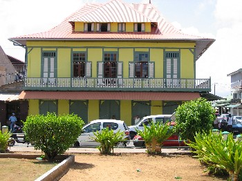 description : maison créole réhabilitée Place du Coq auteur : moi